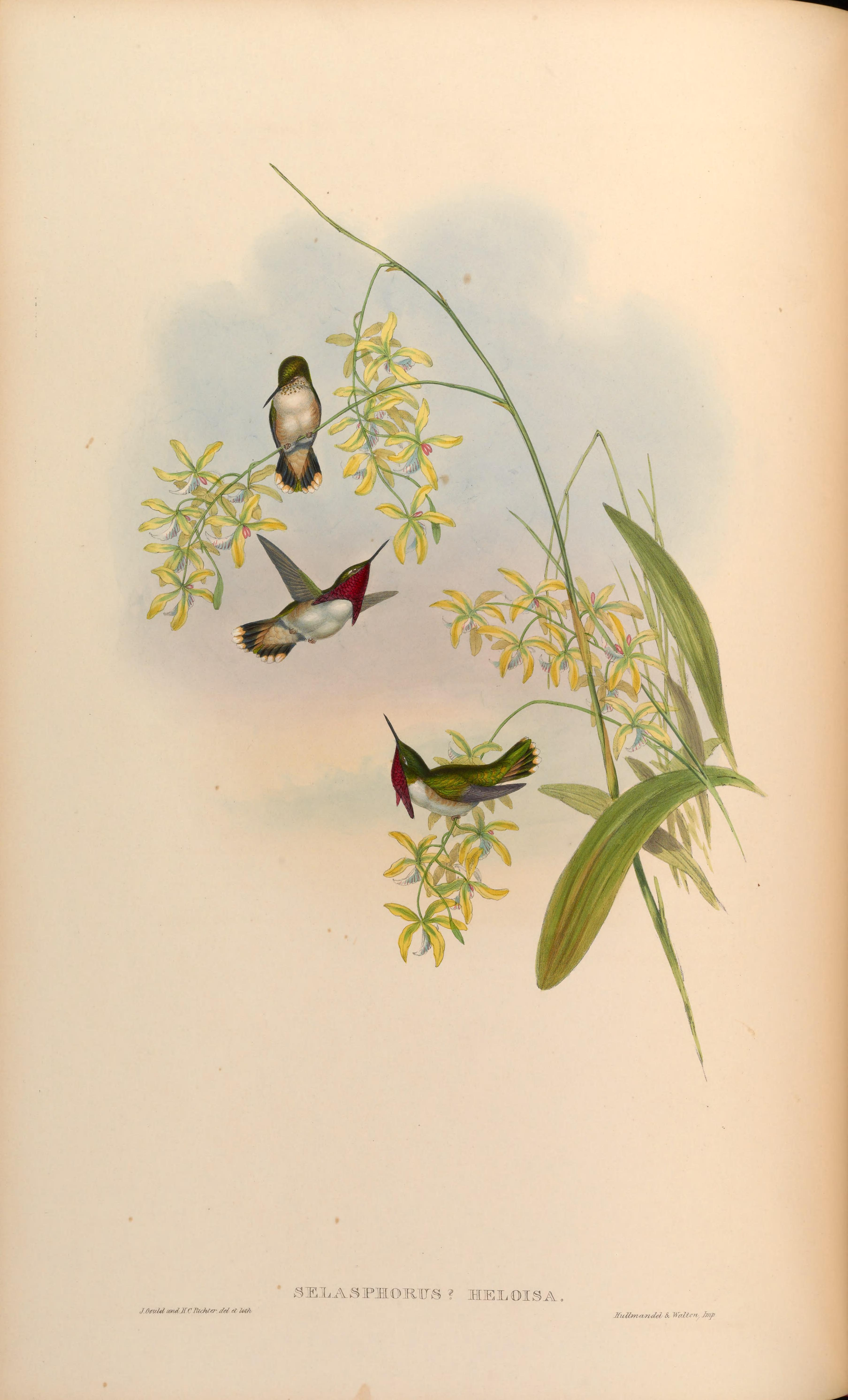 Selasphorus heloisa = Atthis heloisae [1]